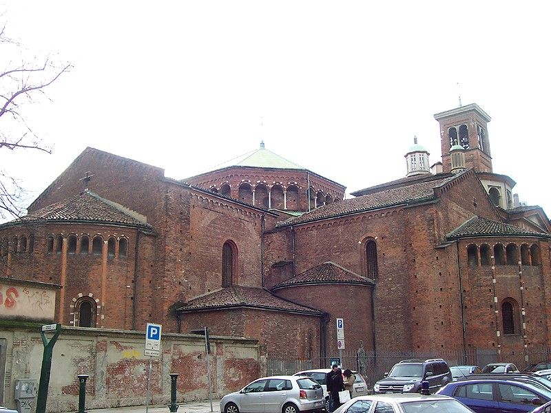 Milano - Abside della Basilica di Nazaro Maggiore